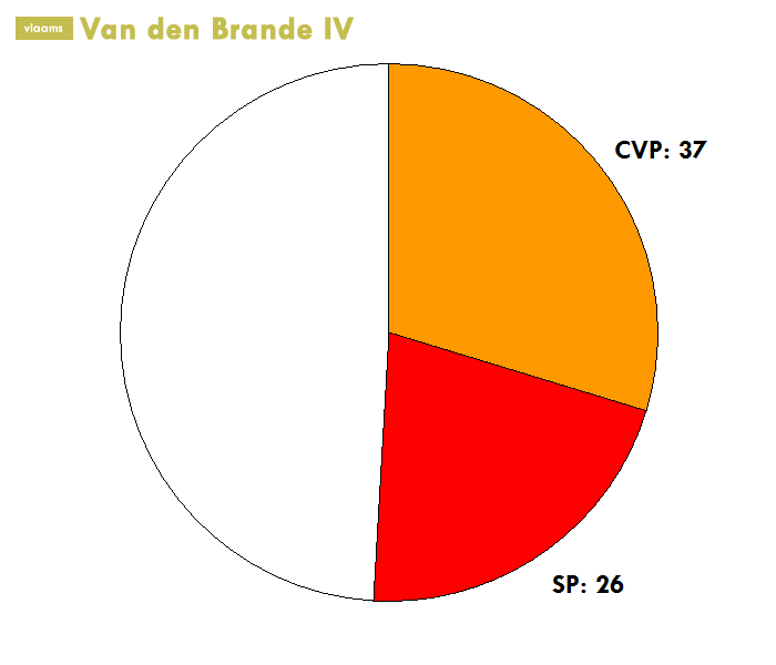 zetelverdeling van de parlementsmeerderheid "Van den Brande IV"